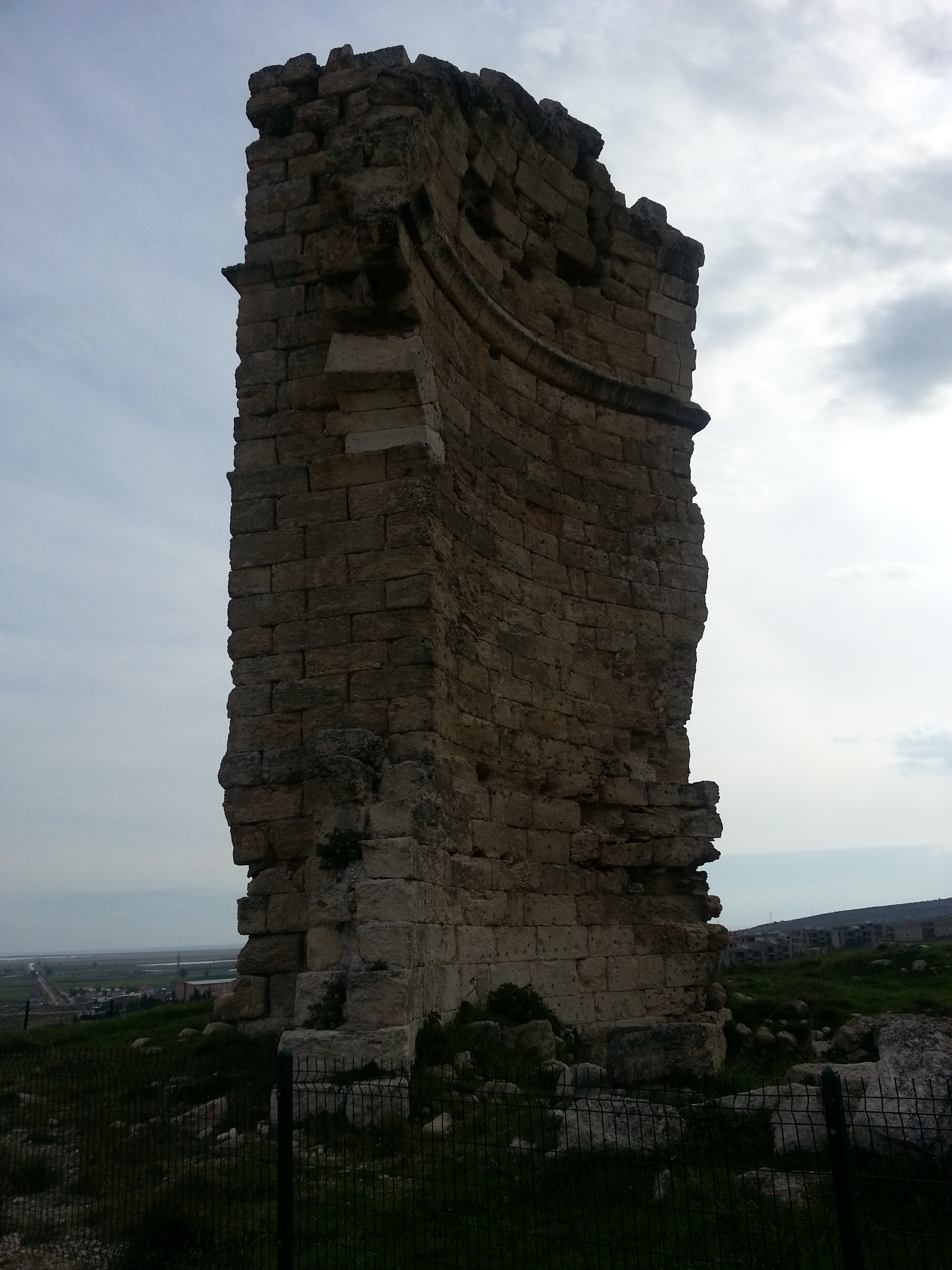 Aya Tekla Bazilikası'nın ayakta kalan tek kısmı.